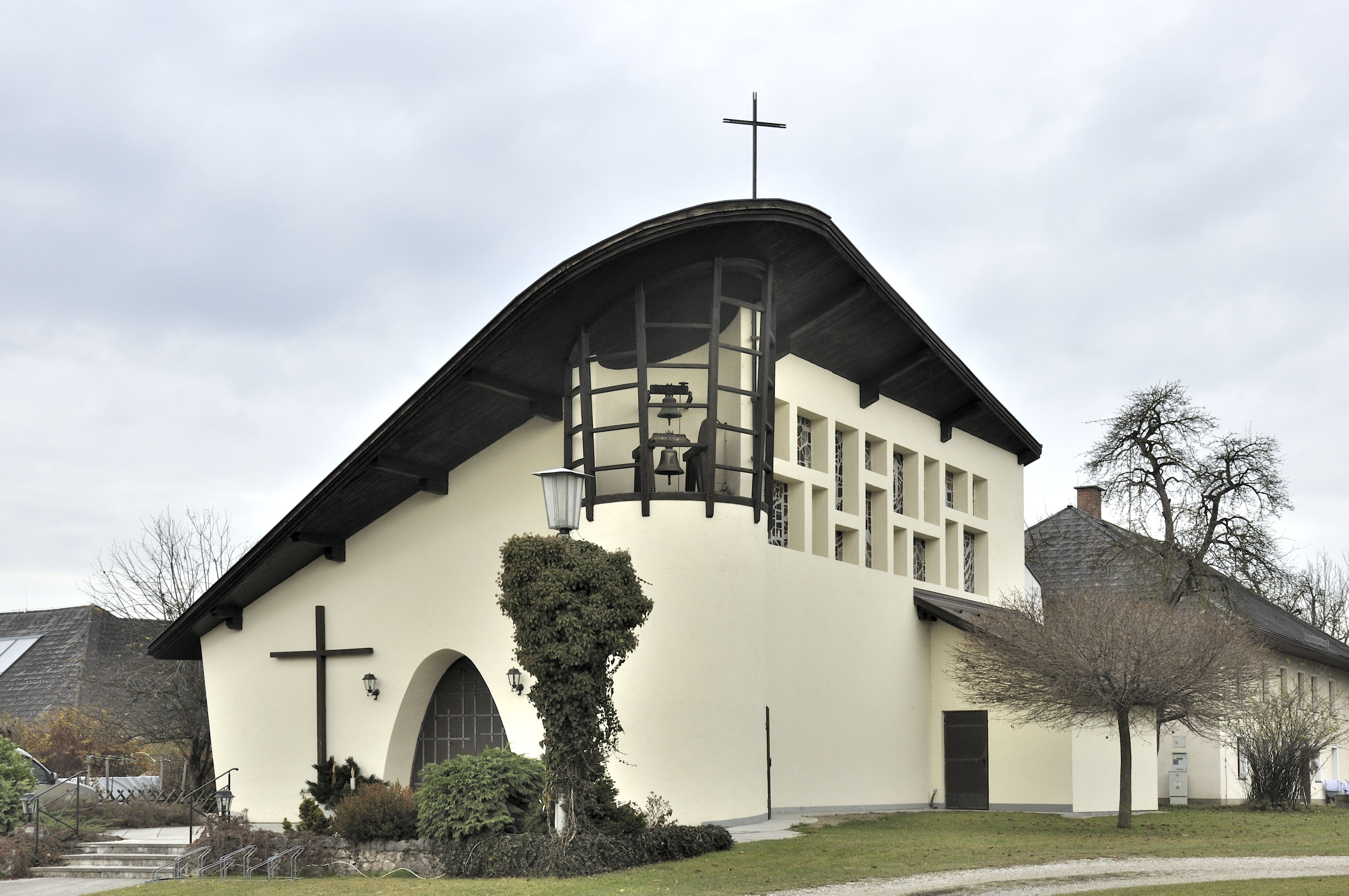 Kath. Filialkirche hl. Ubald